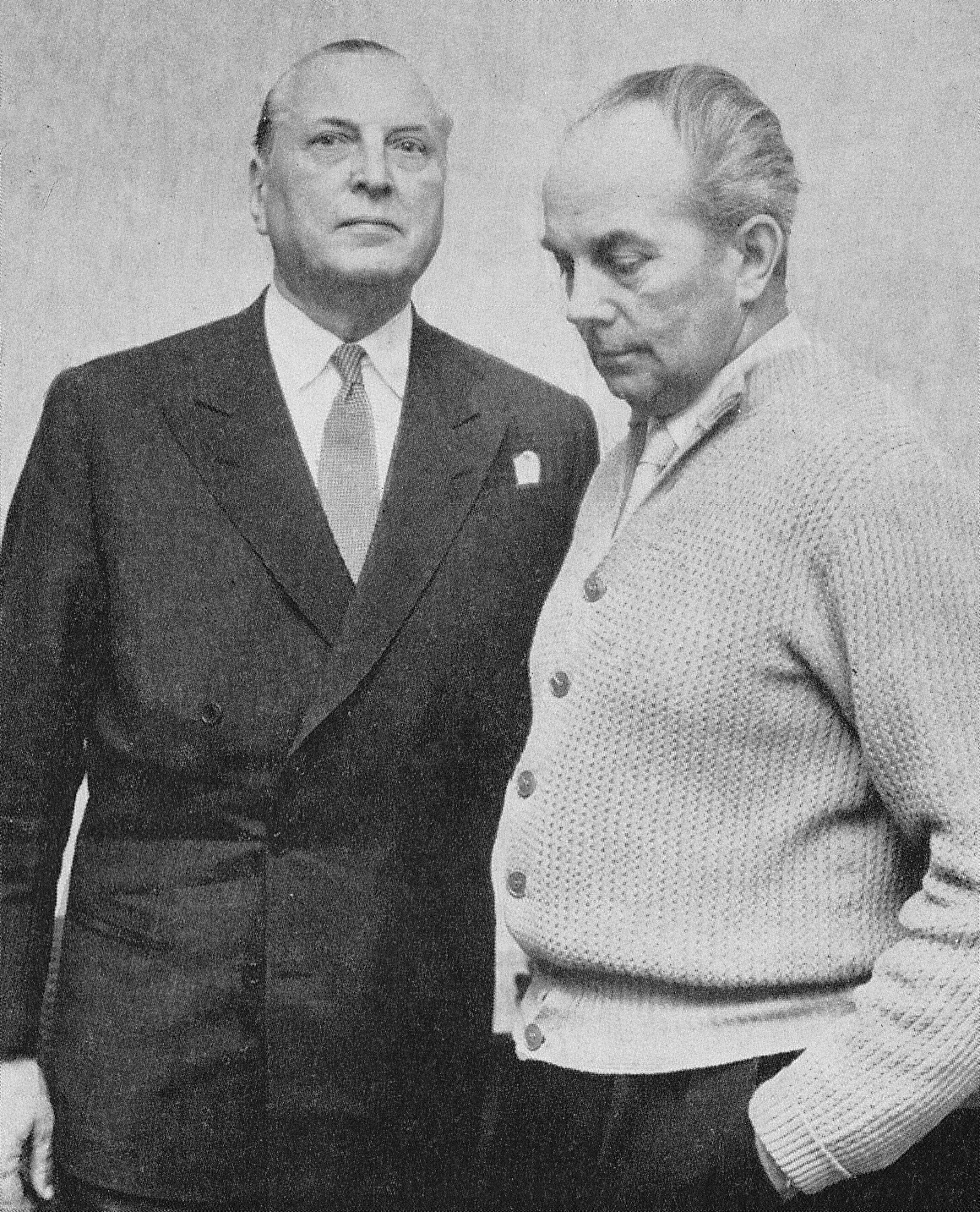 Left: Swedish lawyer Einar Van der Velde (1899-1981), right: Swedish athlete Olle Möller (1906-1983).